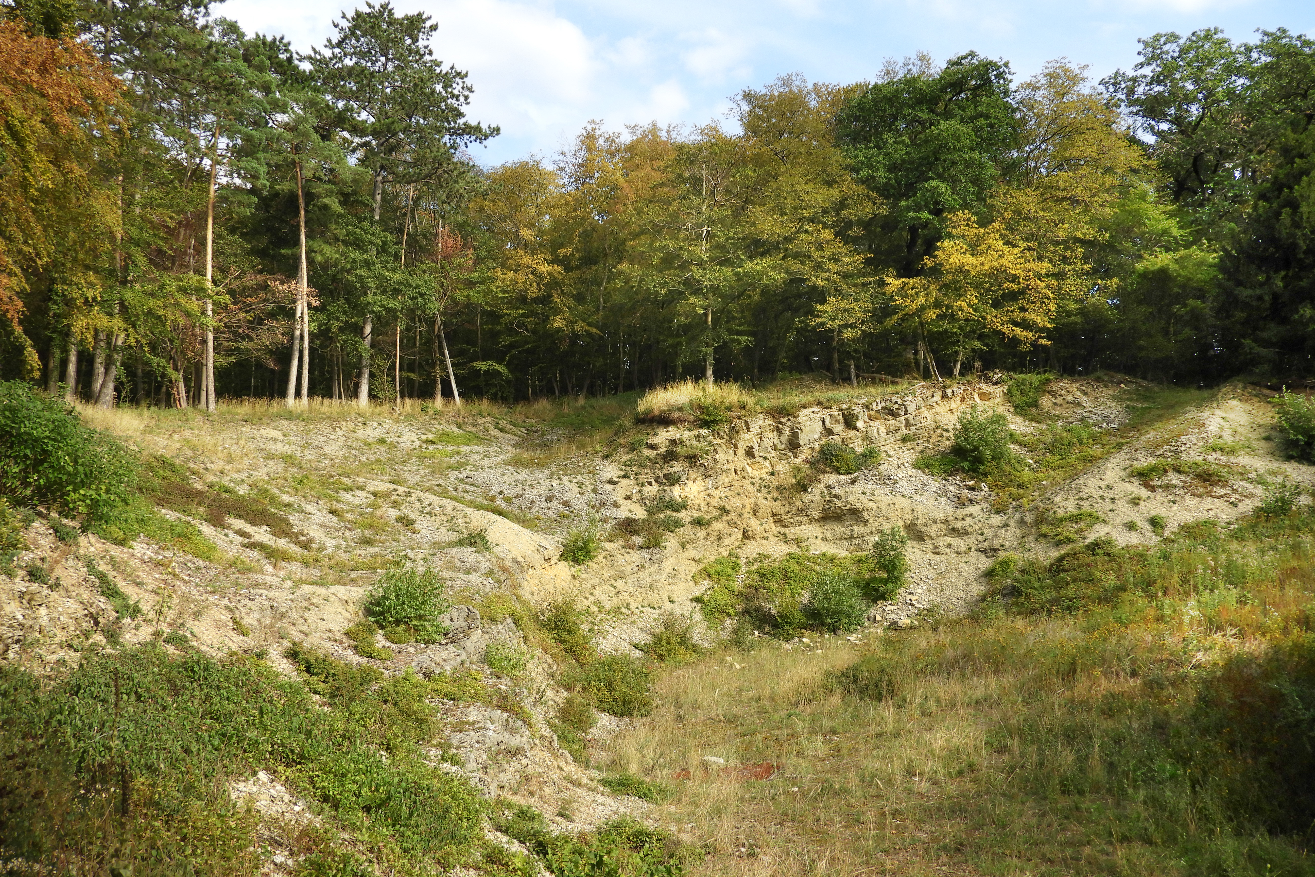 Der „Ermschwerder Heegen“ ist eine, in das untere Tal der Werra hineinragende Erhebung aus Muschelkalk im nordhessischen Werra-Meißner-Kreis. Er erstreckt sich über eine Höhenlage von 132 bis 235 m und besteht aus einem bewaldeten Bereich, einem Feuchtgebiet, Kalkmagerrasen, Streuobstbeständen und landwirtschaftlich genutzten Flächen. Wegen seinem artenreichen Altholzbestand und einem großen Sumpfbiotop mit dem Vorkommen seltener Pflanzen-, Insekten- und Vogelarten wurde der „Heegen“ im Dezember 1985 als Naturschutzgebiet ausgewiesen und später, mit gleichen Gebietsgrenzen und Erhaltungszielen, als Flora-Fauna-Habitat-Gebiet Teil des europäisch vernetzten Schutzgebietssystems „Natura 2000“.